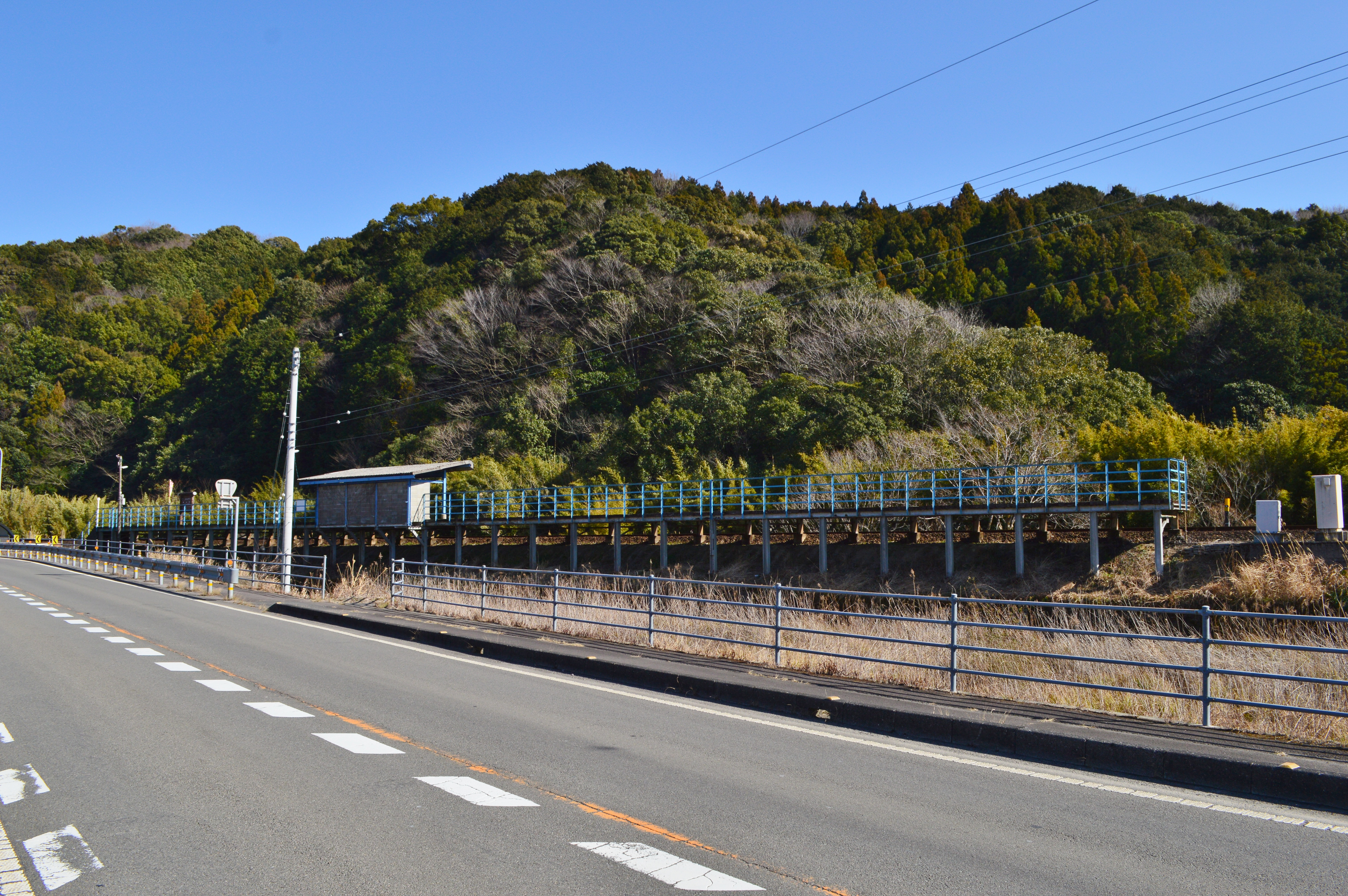 西大方駅 全景